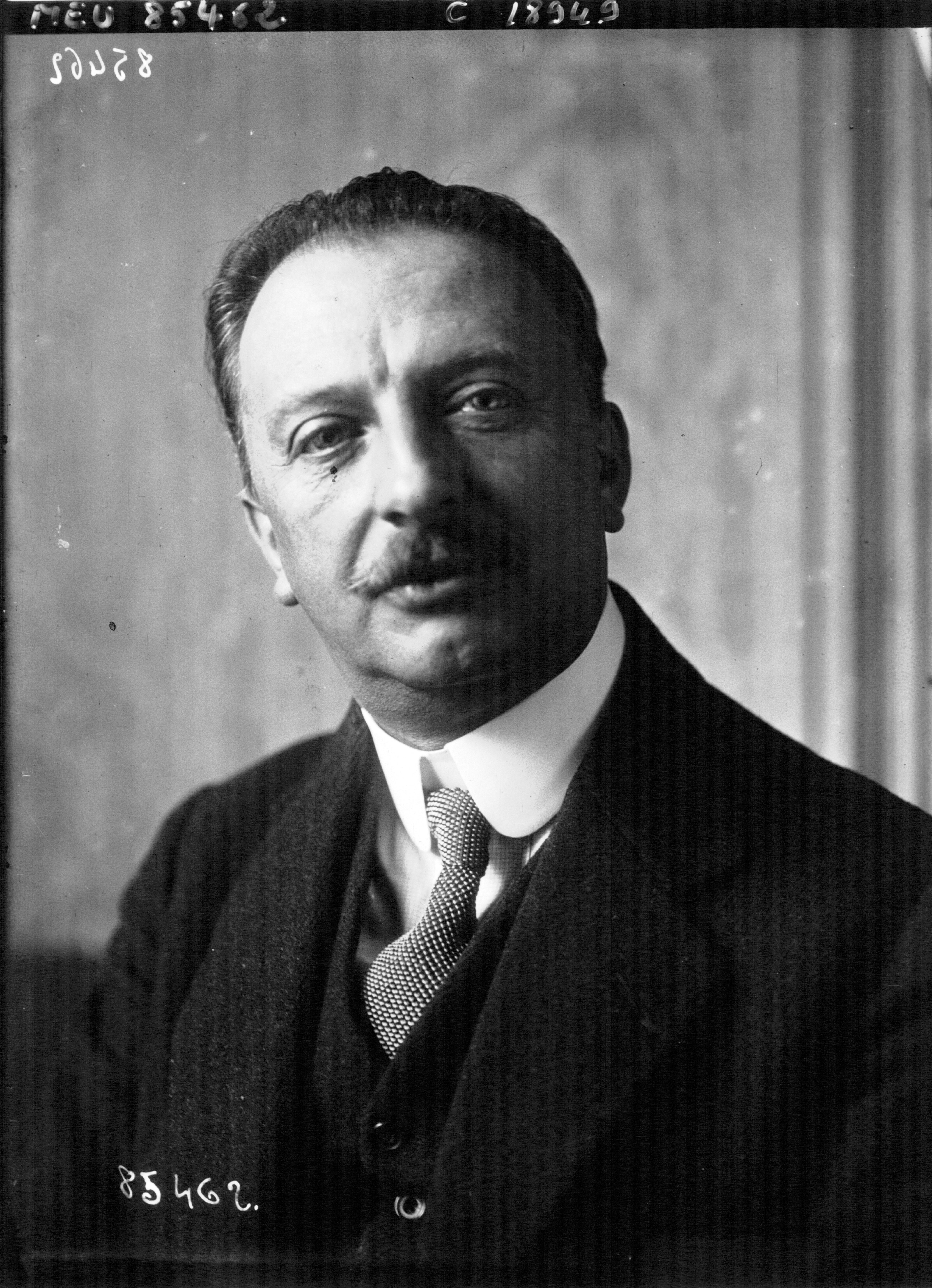 Mr Colrat, député de Seine et Oise, gros plan : photographie de presse